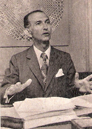 José Martinez de Hoz, ex ministro de economía argentino